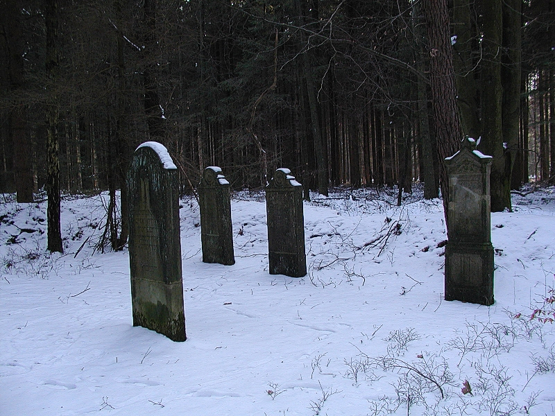 Der Jundenfriedhof in im Wingster Wald zwischen Cadenberge und dem Wasserwerk Wingst